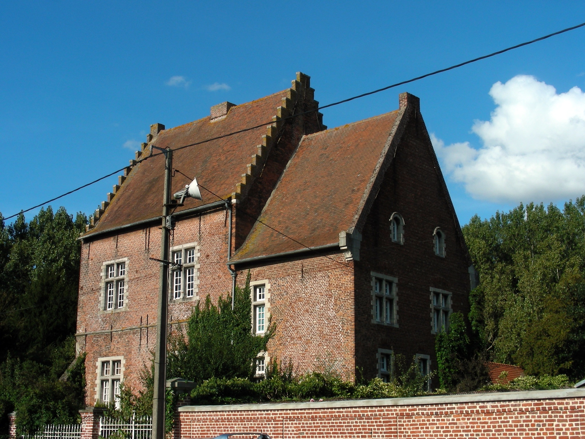 Vue 3/4 .